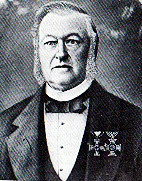 Franz Wilhelm Fickermann lebte von 1814 bis 1888, er war Bürgermeister in Werl vom 2. Dezember 1857 bis zum 24. Mai 1888. Im Jahr 1848 war er stellvertretender Vorsitzender des Constitutionellen Vereins für Stadt und Amt Werl.